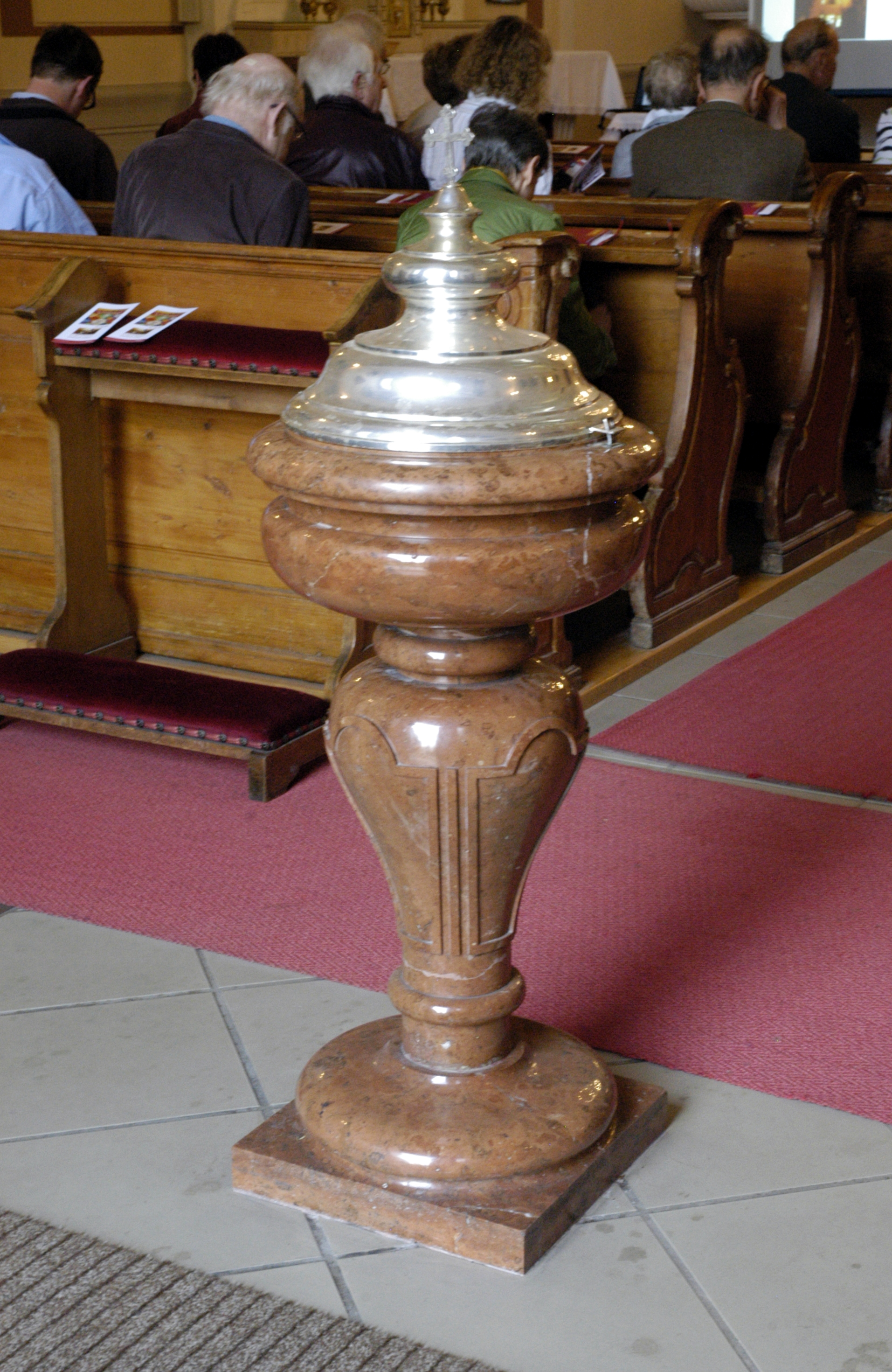 Taufbrunnen in der Invalidenhauskirche